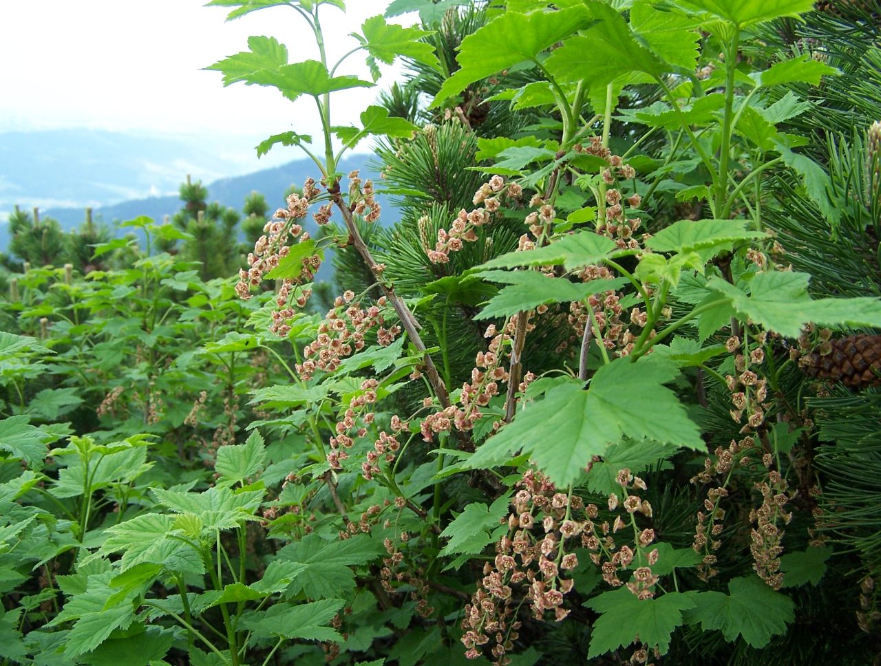 Ribes petraeum (pl. porzeczka skalna), habitat:Tatra Mountains, Hala Upłaz